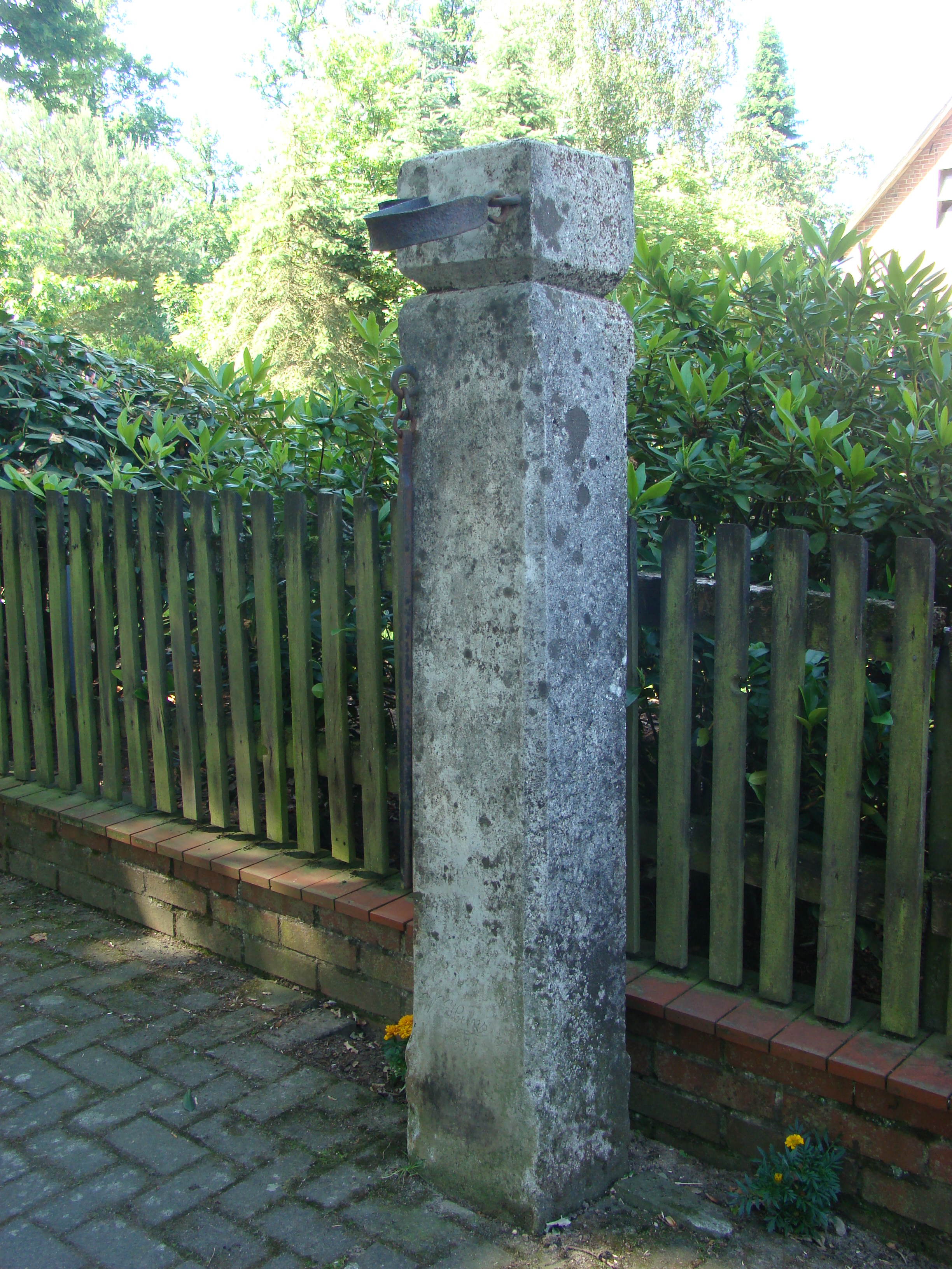 Schandpfahl in Wohlde (Nachbildung)